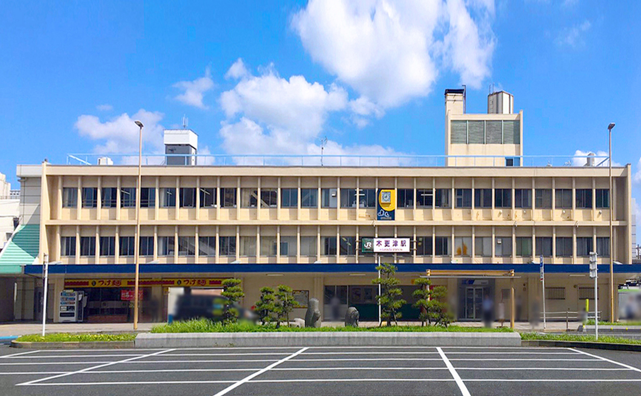 木更津駅西口